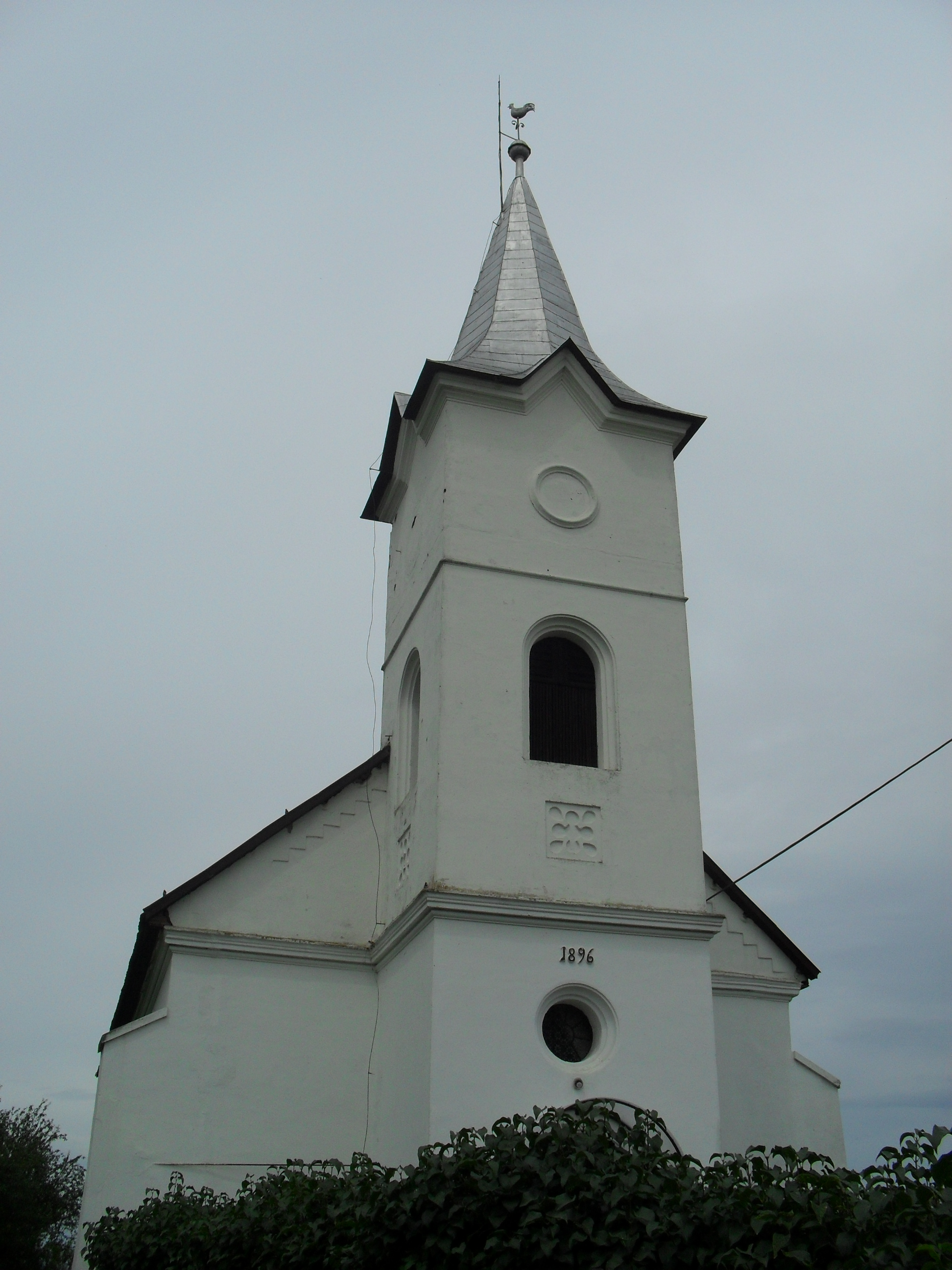 Oldalfala - református templom